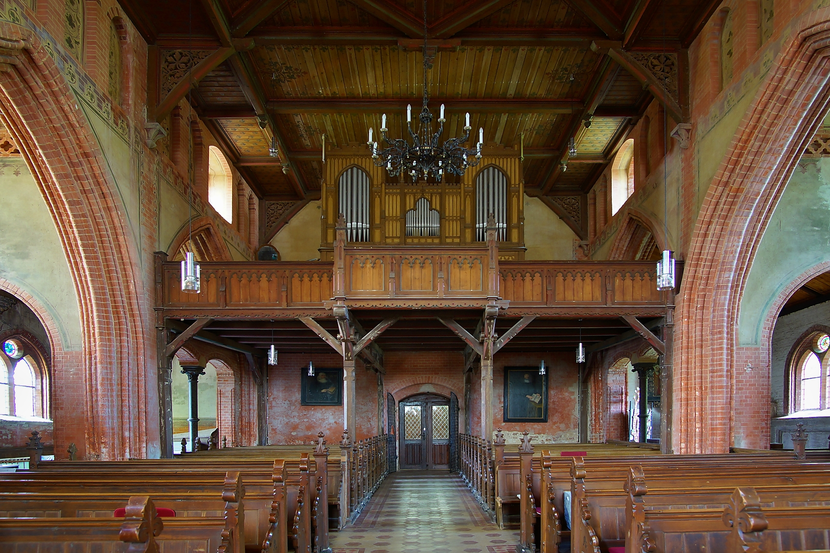 Blick zur Orgel